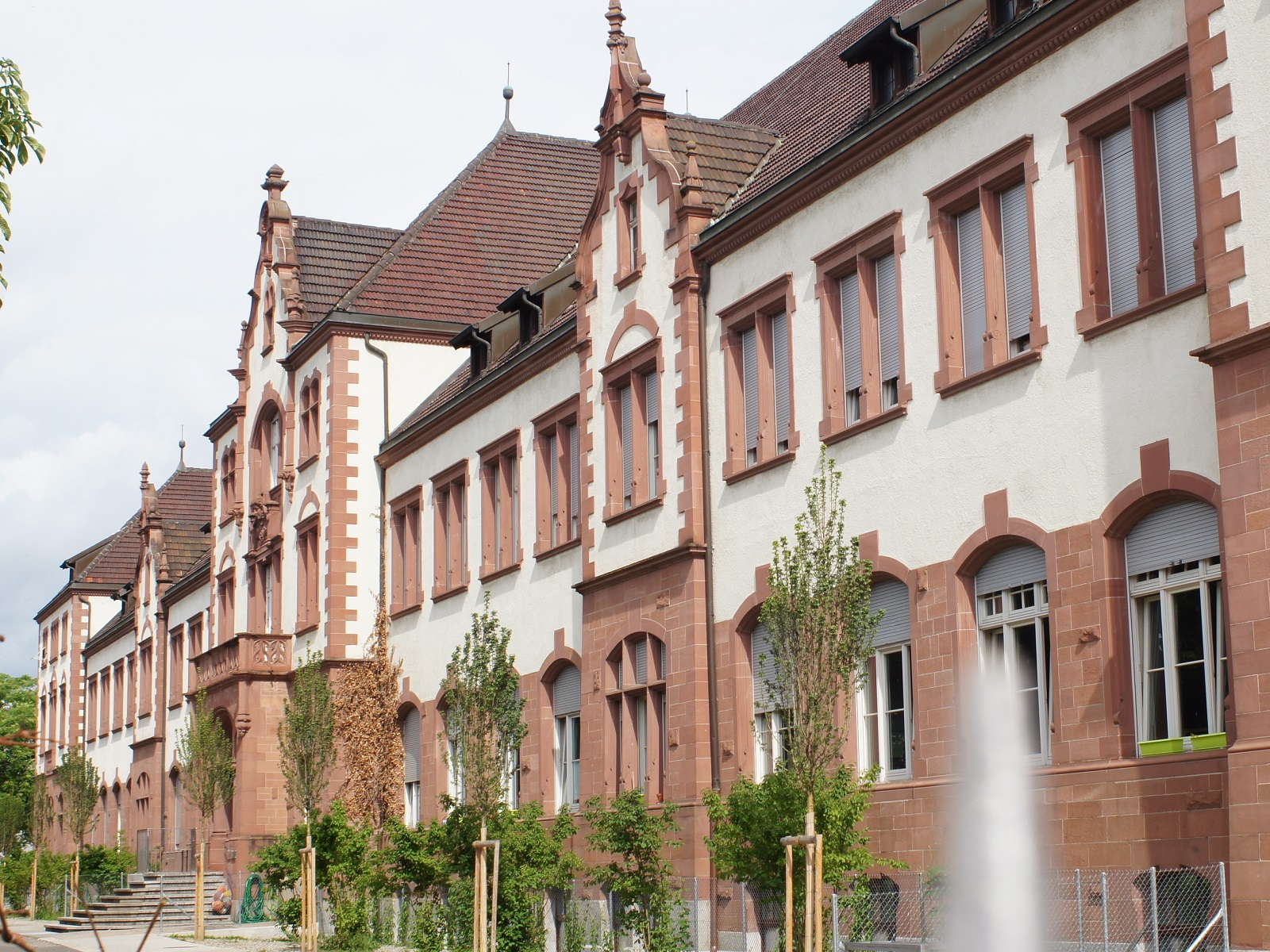 Güterbahnhof Basel Badischer Bahnhof, Verwaltungsgebäude